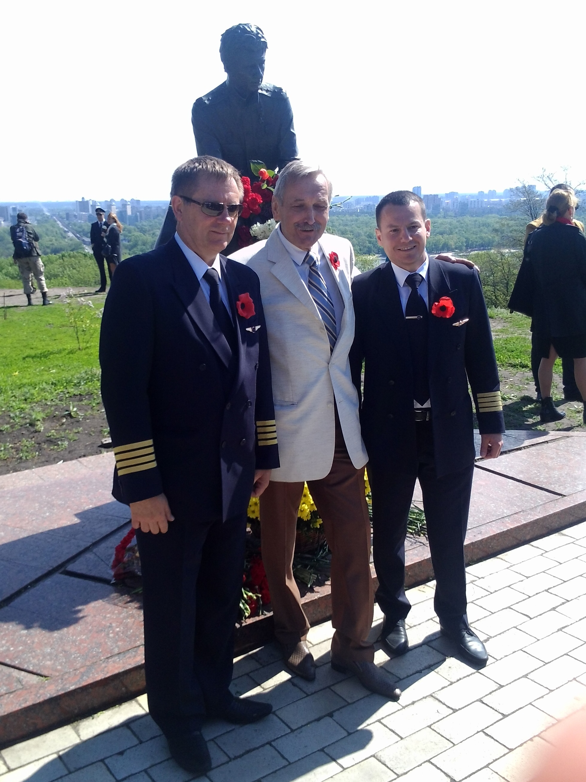 День Перемоги у Києві. 2015 рік. В.Д. Талашко з льотчиками.